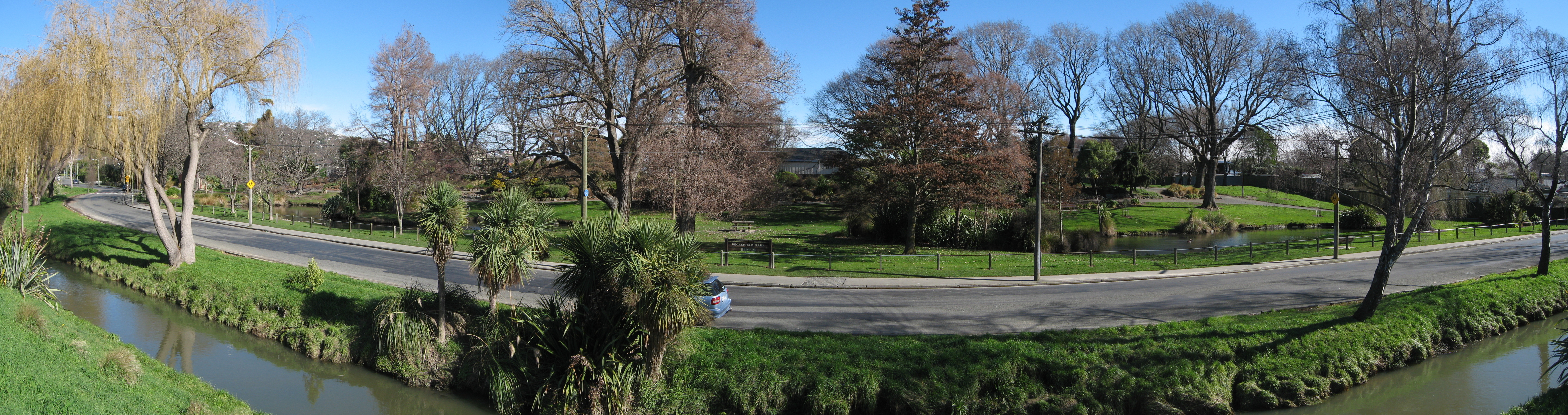 Heathcote River and Beckenham Park, Beckenham, Christchurch, New Zealand